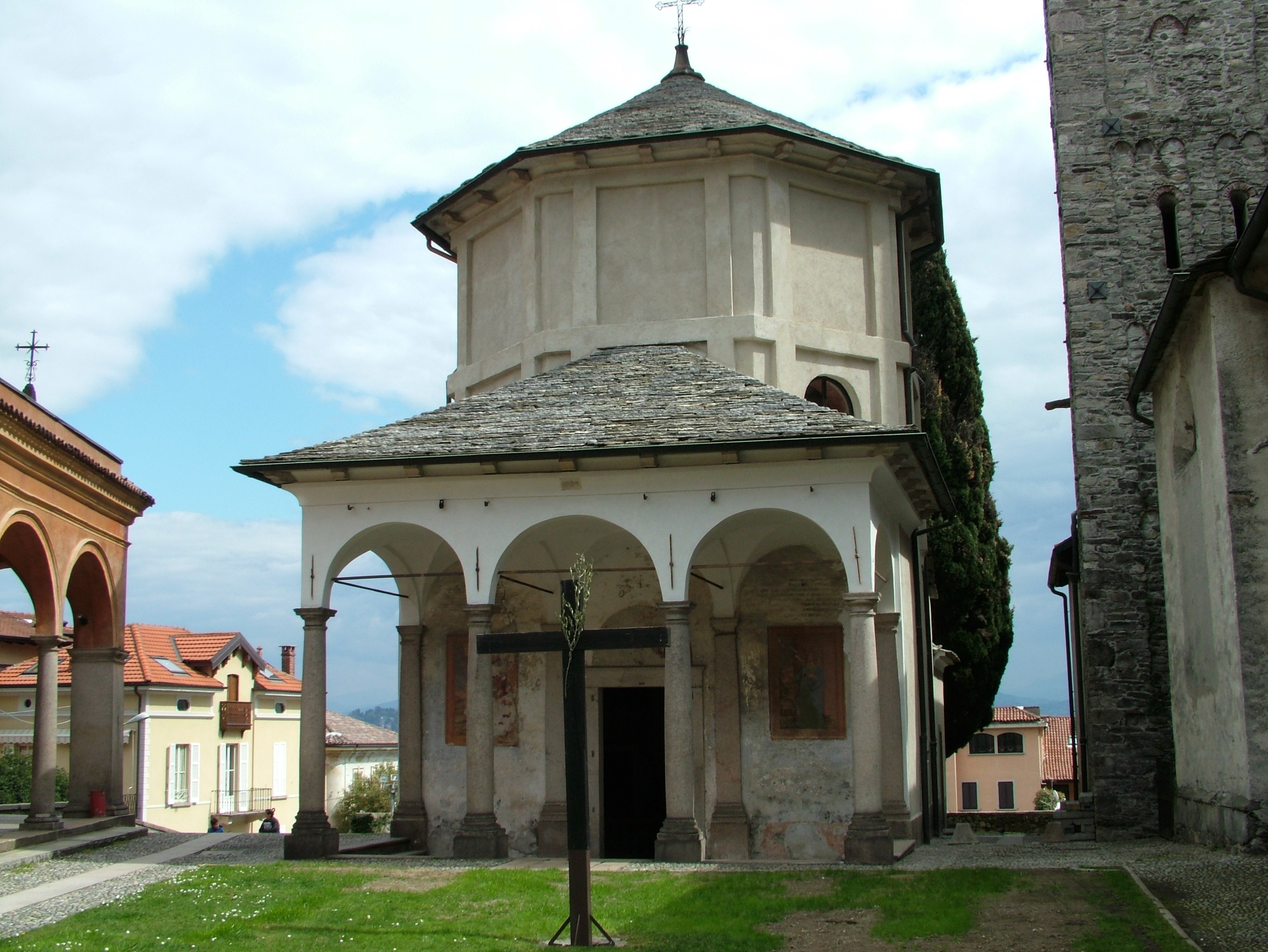 Baveno, Region Piemont, die Kirche